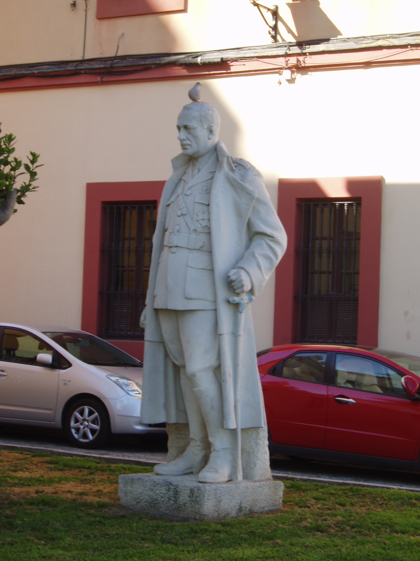 Estatua de Miguel Primo de Rivera en Cádiz.